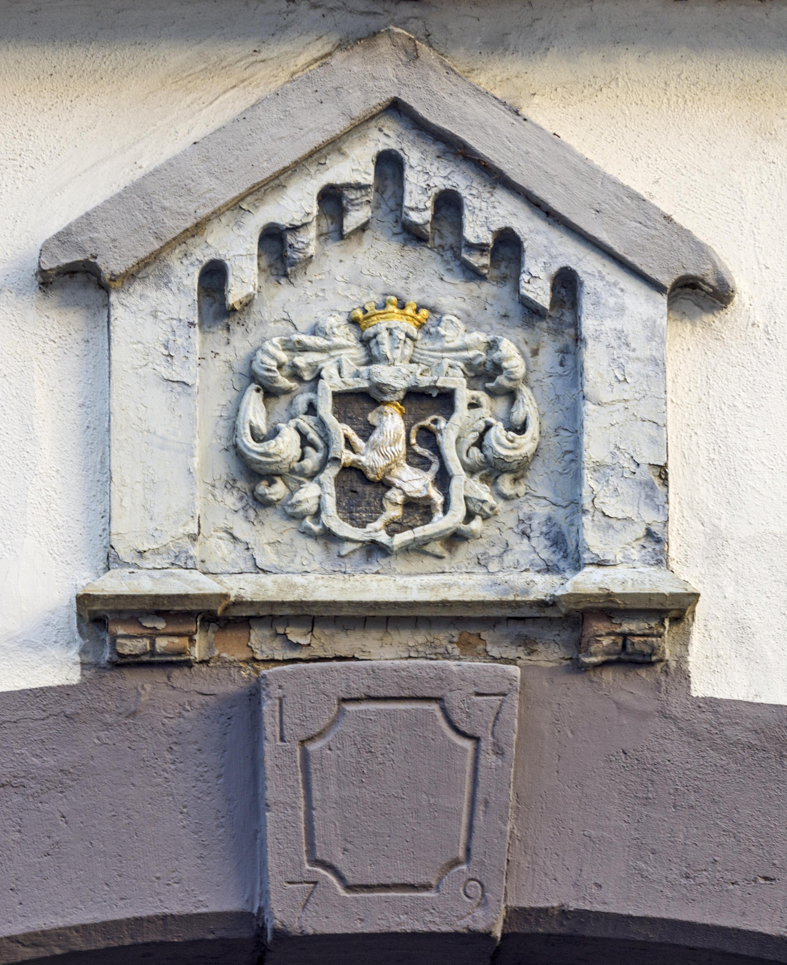 Gebäude in Freiburg